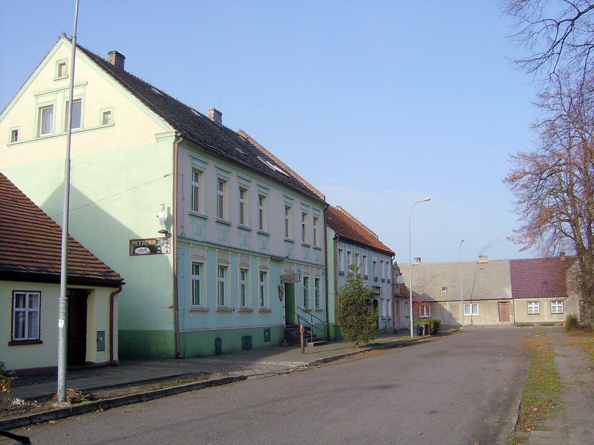 Brójce (gm. Trzciel, woj. lubuskie, Poland}